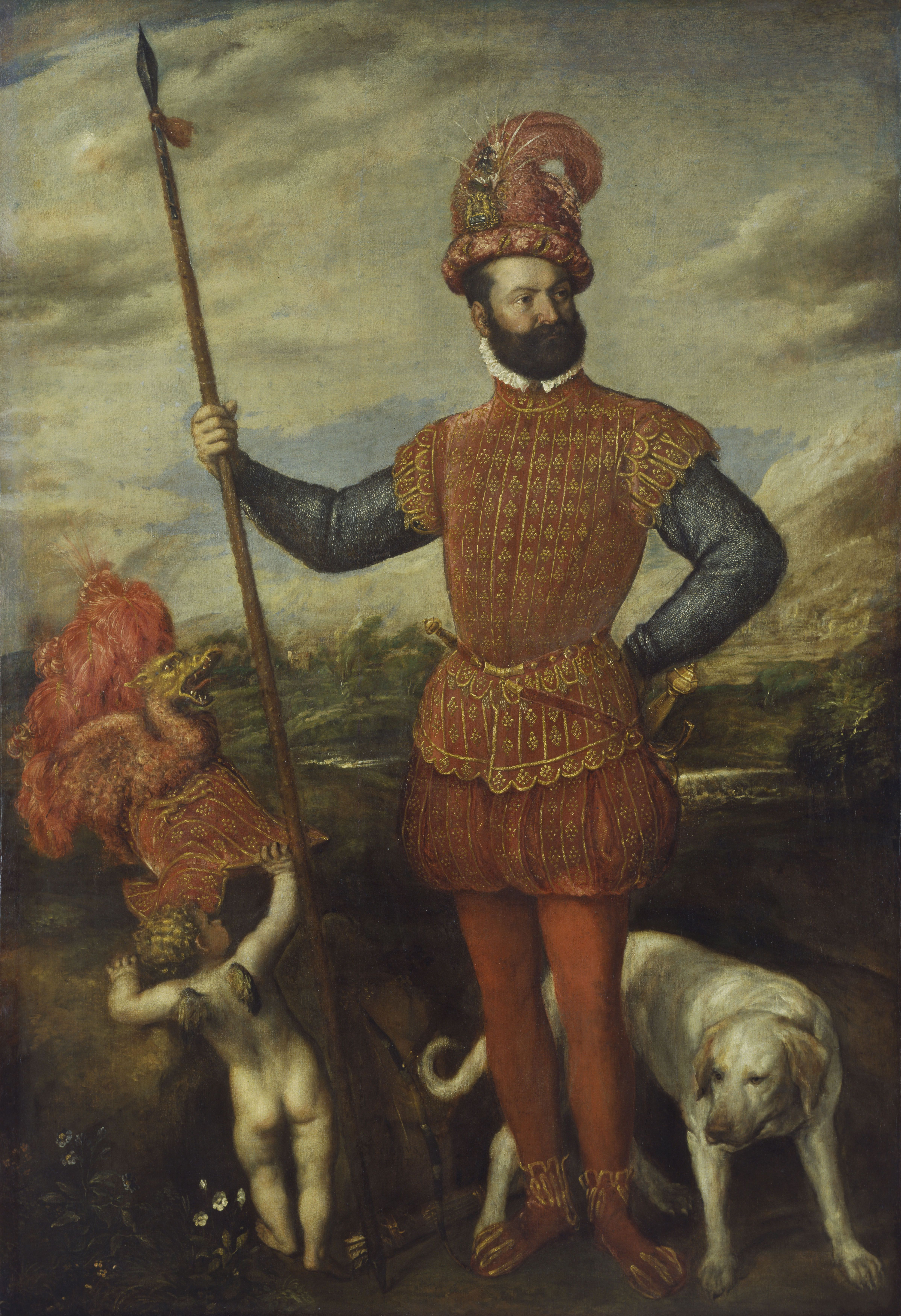 "Das lebensgroße Porträt mit allegorischen Elementen, eines der aufwendigsten und anspruchvollsten Bildnisse Tizians, verweist durch das Beiwerk (Amor, Lanze, Hund) und den Prunkharnisch auf militärische Führerschaft, Jagd und Liebe. Vielfache Bemühungen um die Identifizierung haben noch nicht zu einem allgemein akzeptierten Ergebnis geführt. Wethey versuchte eine Neubelebung von Carl Justis Hypothese, das Bild sei identisch mit einem von Aretino überlieferten, 1552 oder kurz davor entstandenen Porträt des Giovanni Francesco Acquaviva von Aragon, Herzog von Atri. H. Ost schlug mit ausführlicher Begründung den kaiserlichen Feldherrn Gabriele Serbelloni (1509-80) vor. Demgegenüber sprach sich Lehmann für Ferrante Gonzaga (1507 bis 1557) aus, Bruder des Herzogs von Mantua und Feldherr Karls V. In diesem Fall befremdet allerdings das Fehlen des Ordens vom Goldenen Vlies, der Ferrante 1531 verliehen wurde (Ost 1992). Nach bisheriger übereinstimmender Auffassung entstand die Figur um 1550-52, der Landschaftshintergrund erst um 1560-70. Neuerdings vermutet Ost eine Entstehung des gesamten Bildes um 1550." (cited from: Gemäldegalerie Alte Meister, Kassel)